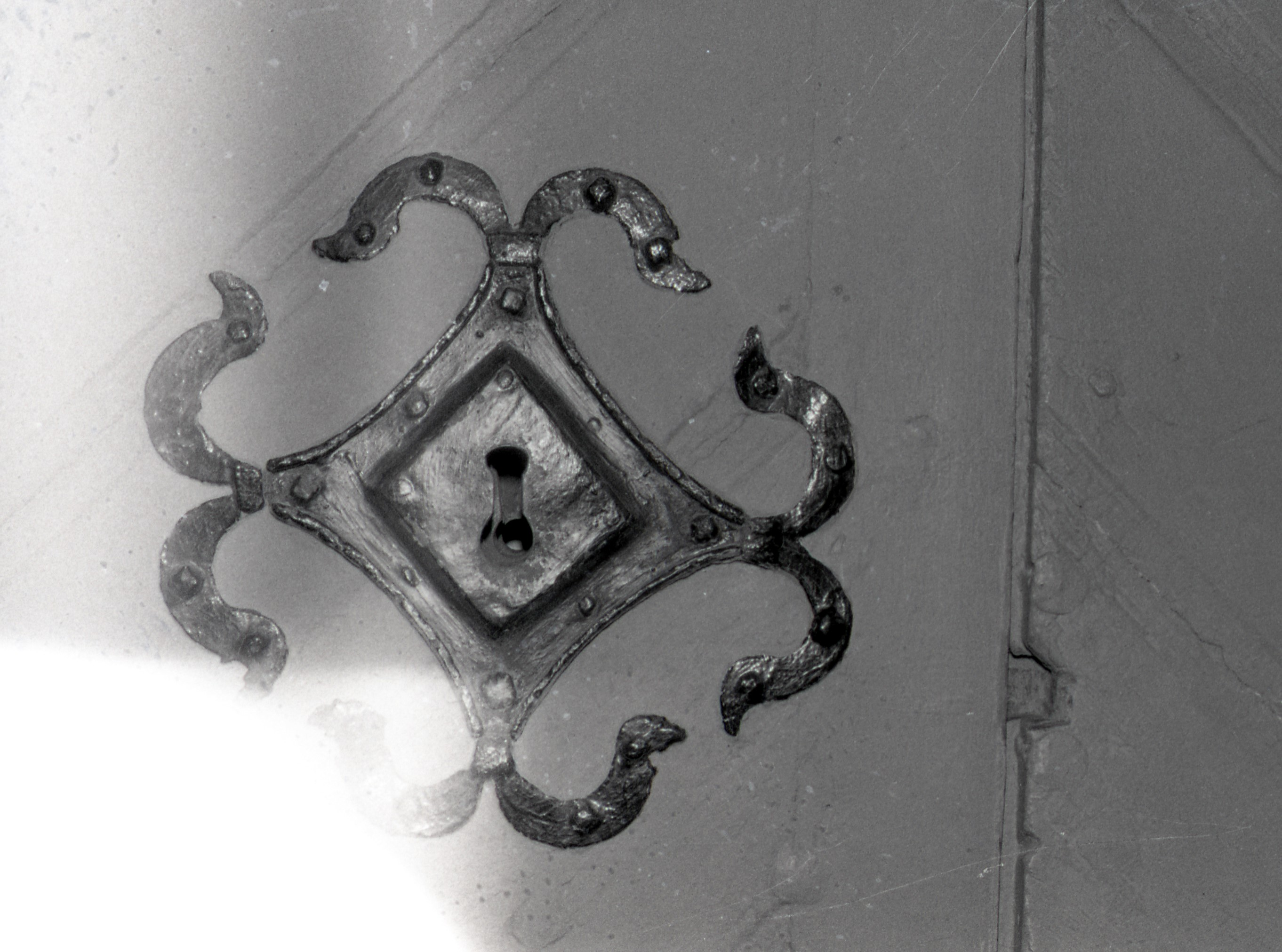 Dørbeslag i sørportalen i Våler kirke fra 1806, opprinnelig fra Mariakirken. Foto: Martin Blindheim. Fra Unimus (jf. [ søk). Bestillingsnr. CfL01257_001.